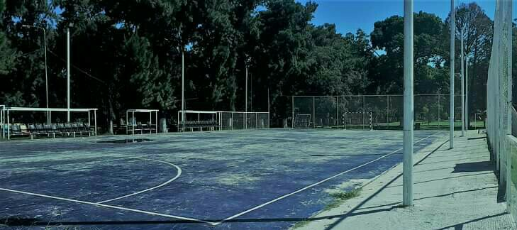 Cancha Multideportiva